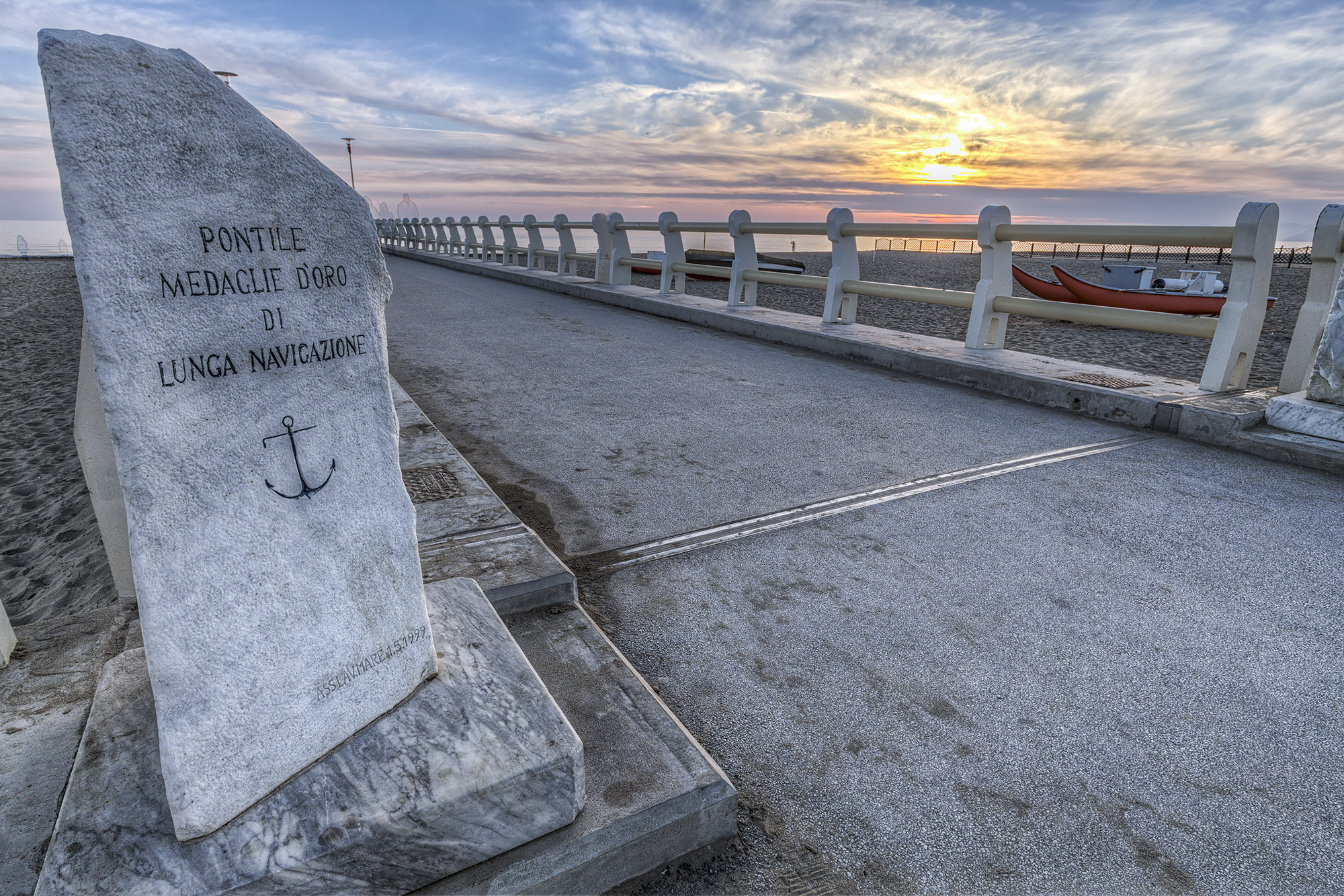 Pontile di Forte dei Marmi This is a photo of a monument which is part of cultural heritage of Italy.